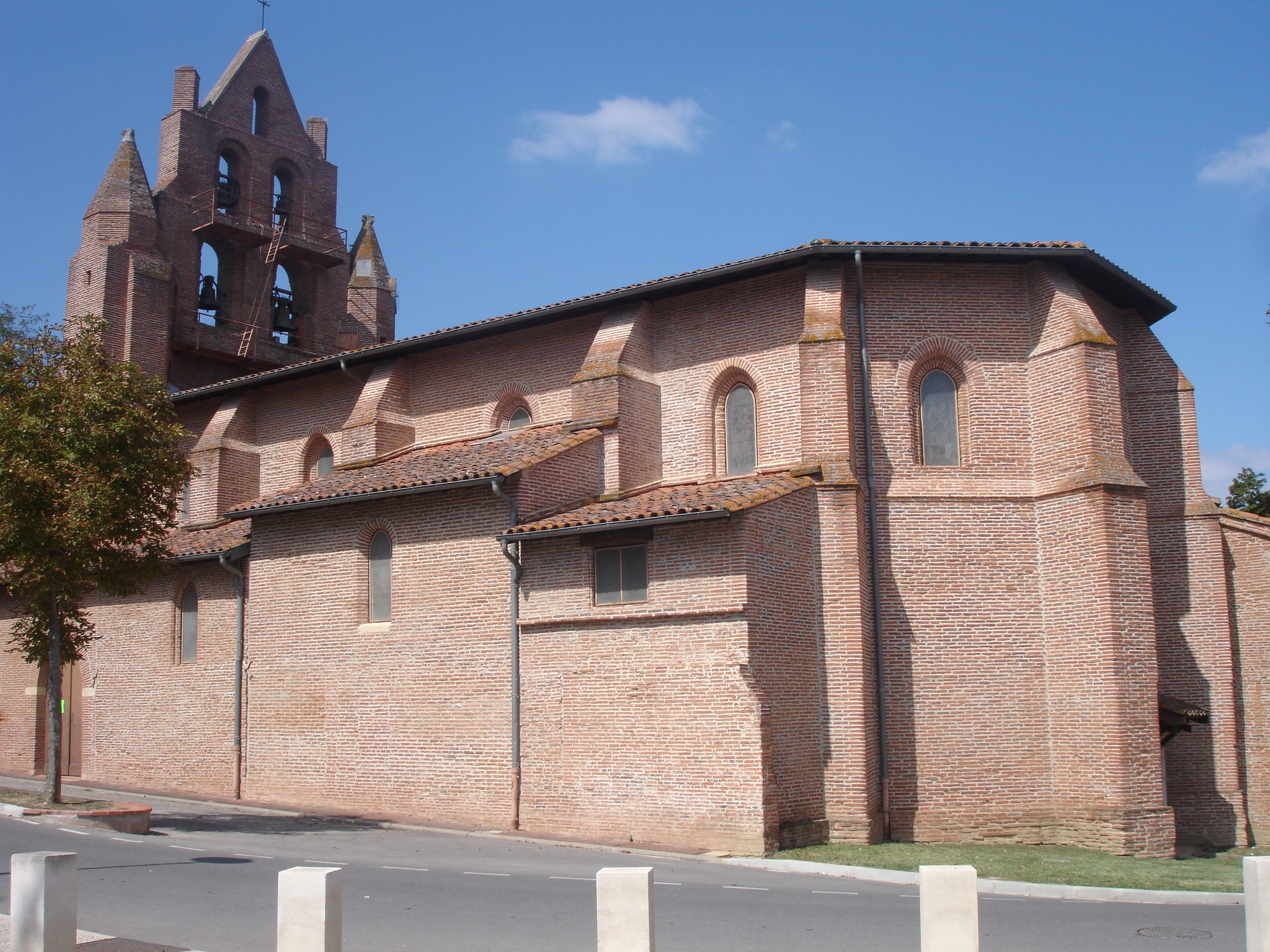 France, Haute-Garonne (31), Ayguesvives, église